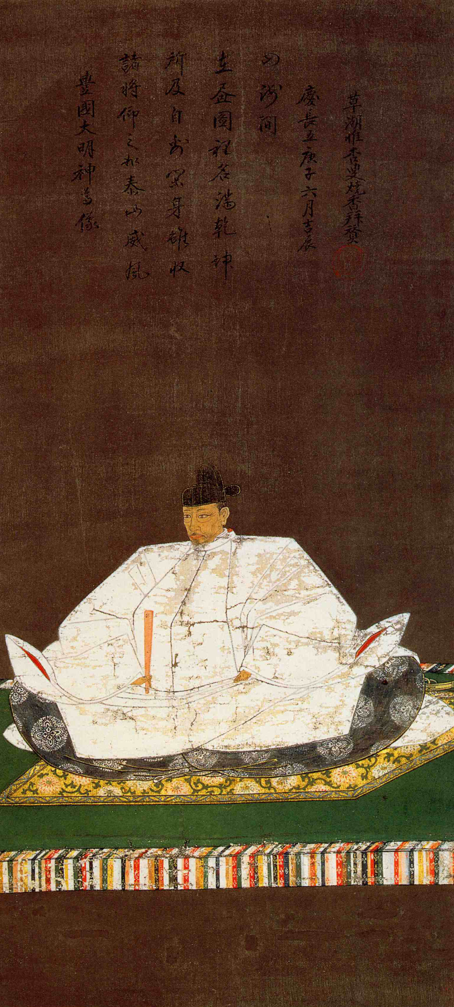 豊臣秀吉像